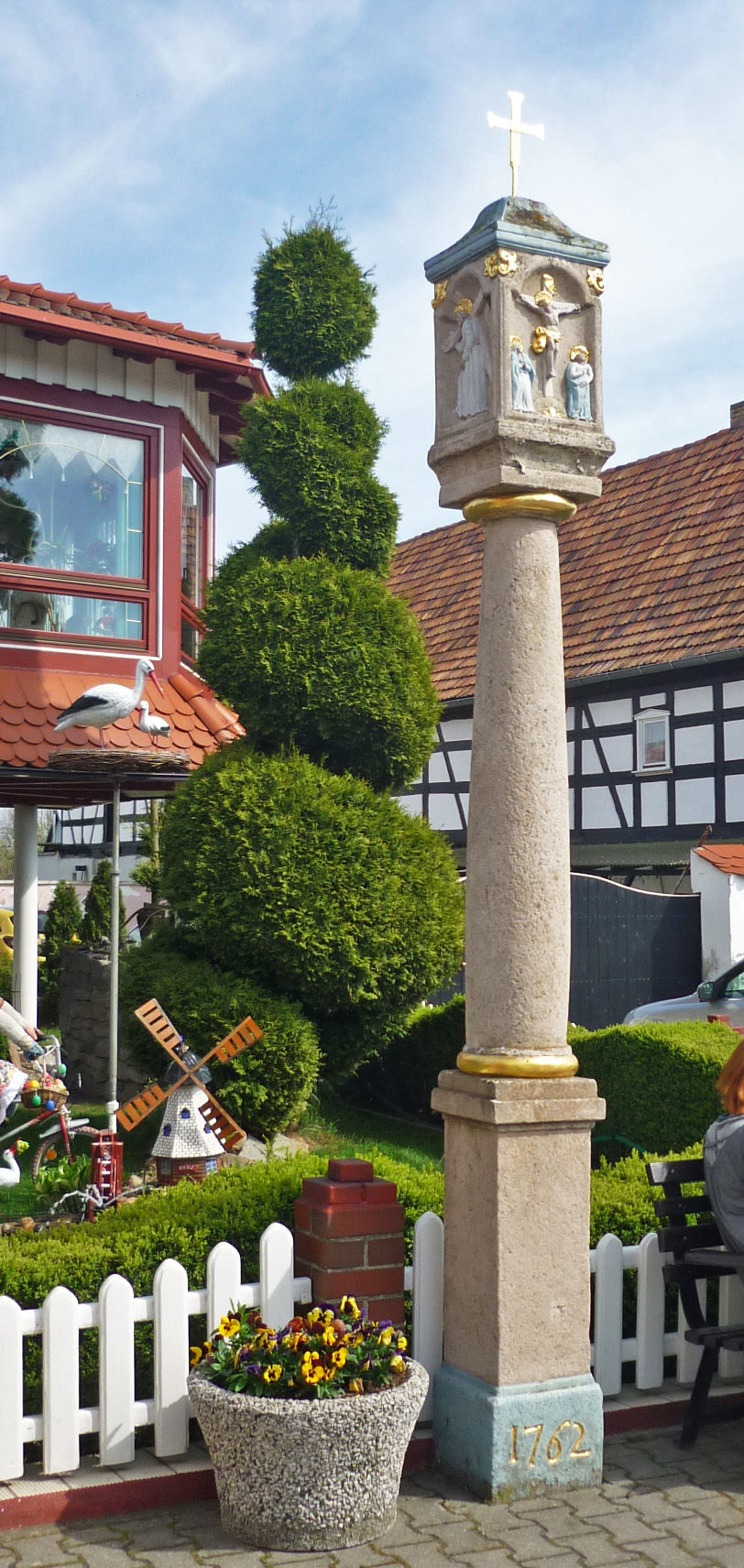 Bildstock in Cunnewitz neben der Kapelle Hornjoserbsce: Stołp při Konječanskej kapałce